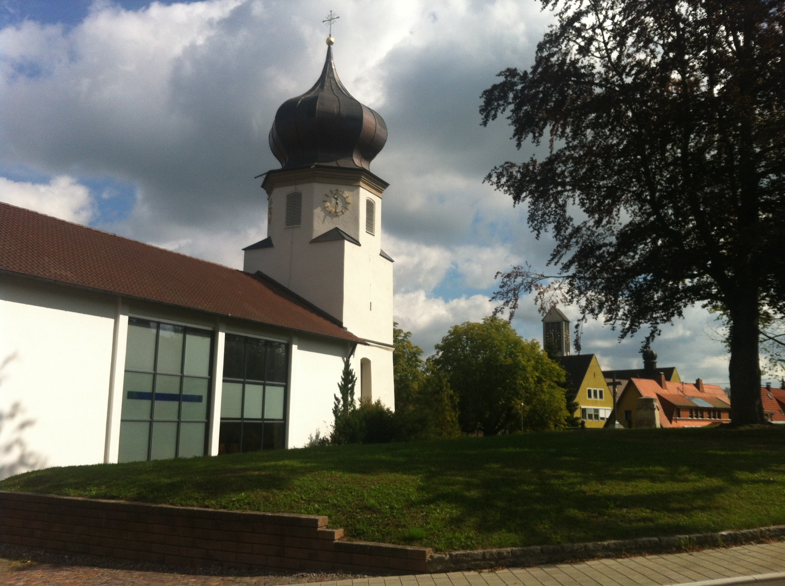 BB Blumberg, Stadt im Schwarzwald-Baar-Kreis in Baden-Württemberg. Heute die Evangelische Kirche (mit neuem Kirchenschiff), die 1952 von der Gemeinde erworben wurde, zuvor Katholische und Altkatholische Kirche, der erhaltene Zwiebelturm stammt aus der Mitte des 17. Jahrhunderts.